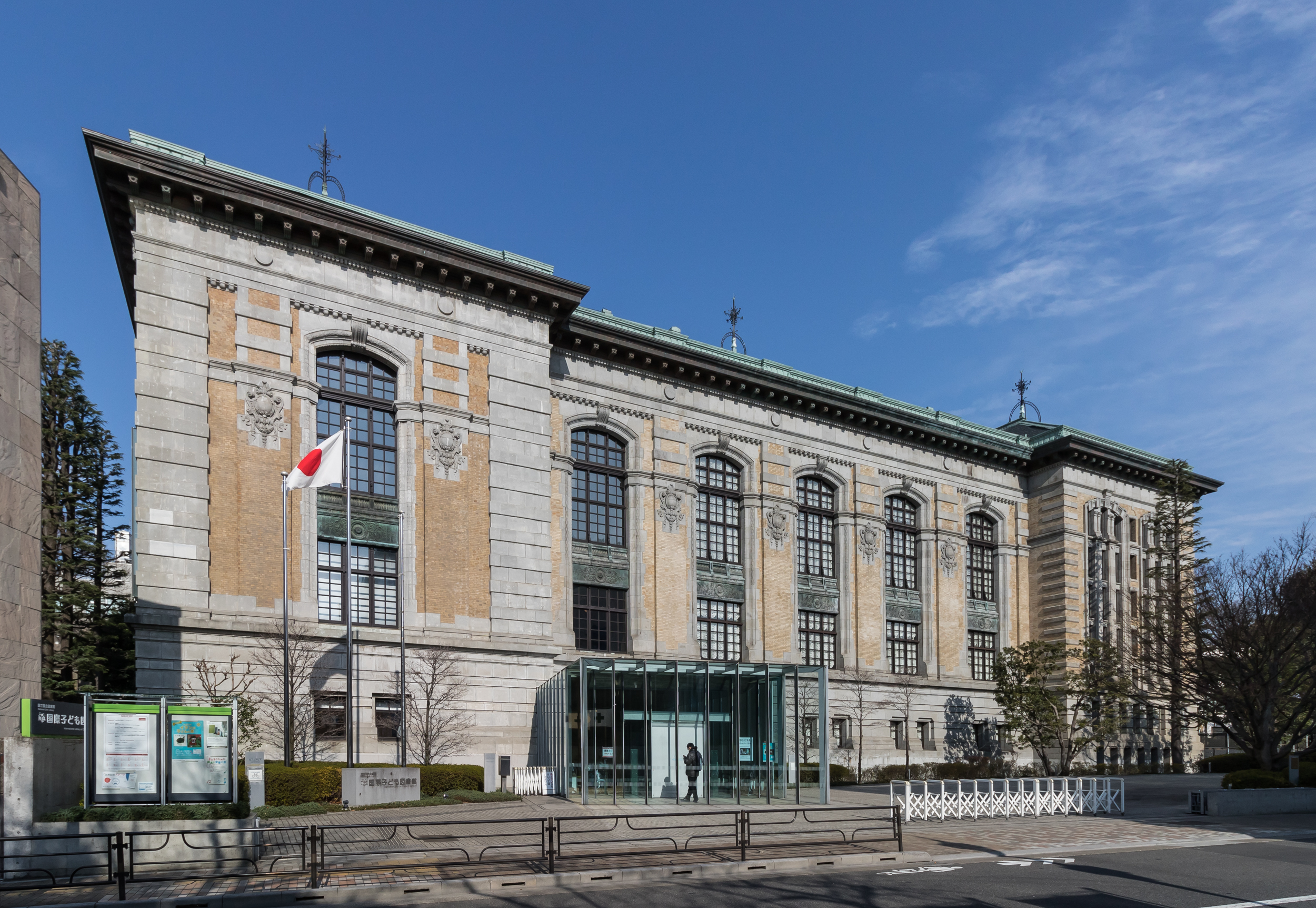 国際子ども図書館（旧帝国図書館）、東京都台東区。